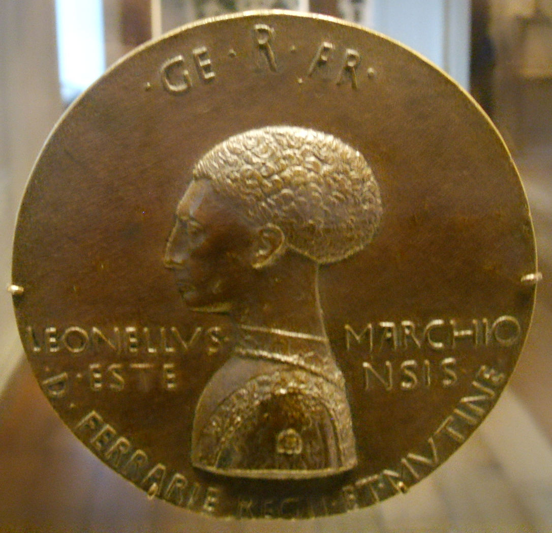 National gallery in washington d.c., pisanello, medaglia di leonello d'este 1444 recto